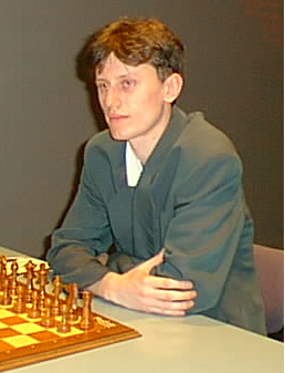 Zoltan Almasi, Dortmunder Schachtage 1998.